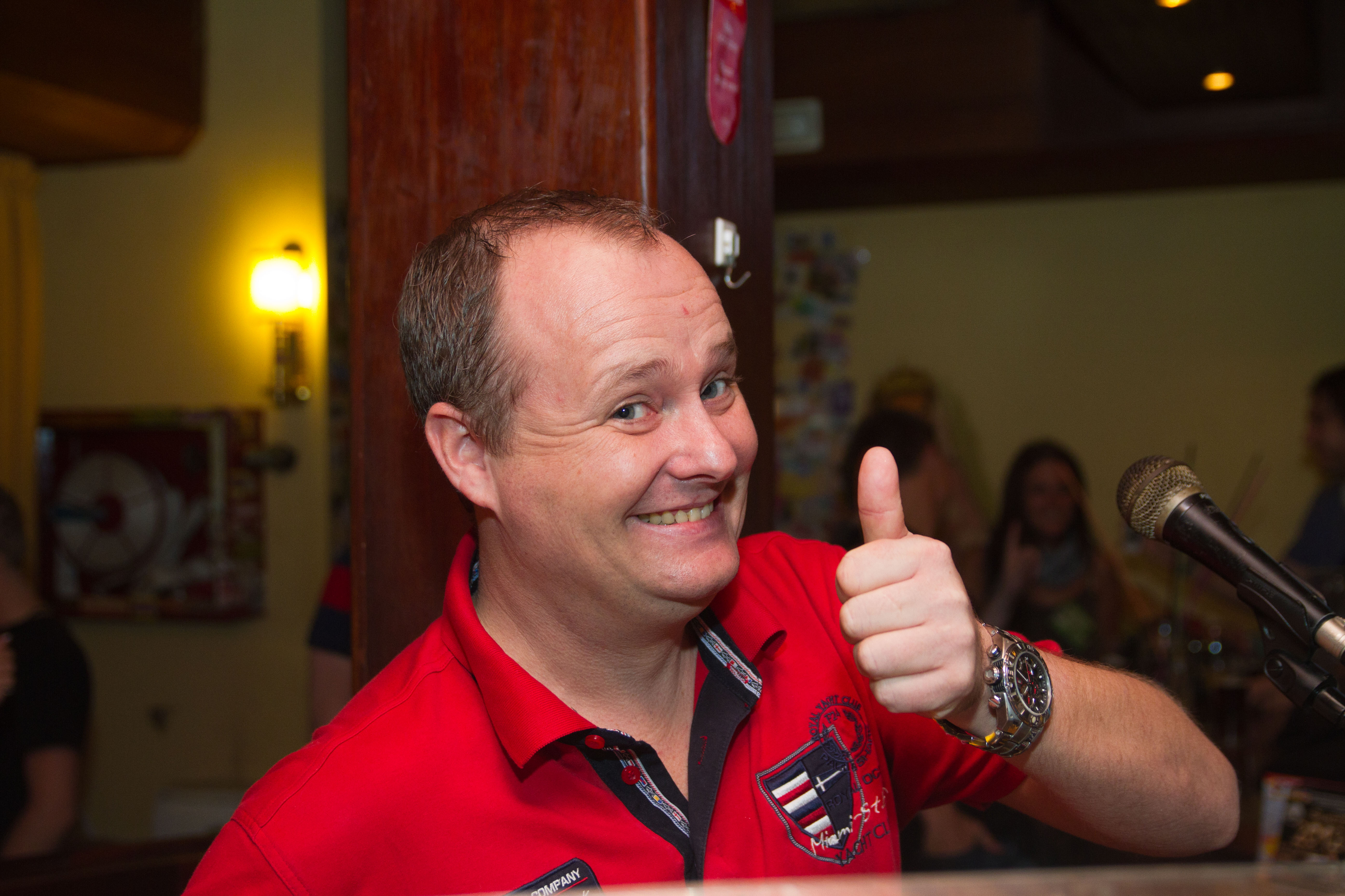 DJ Düse bei der Arbeit im Bierkönig auf Mallorca im Oktober 2011